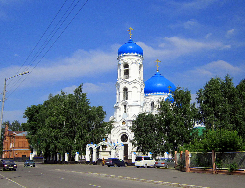 Успенский собор в Бийске.